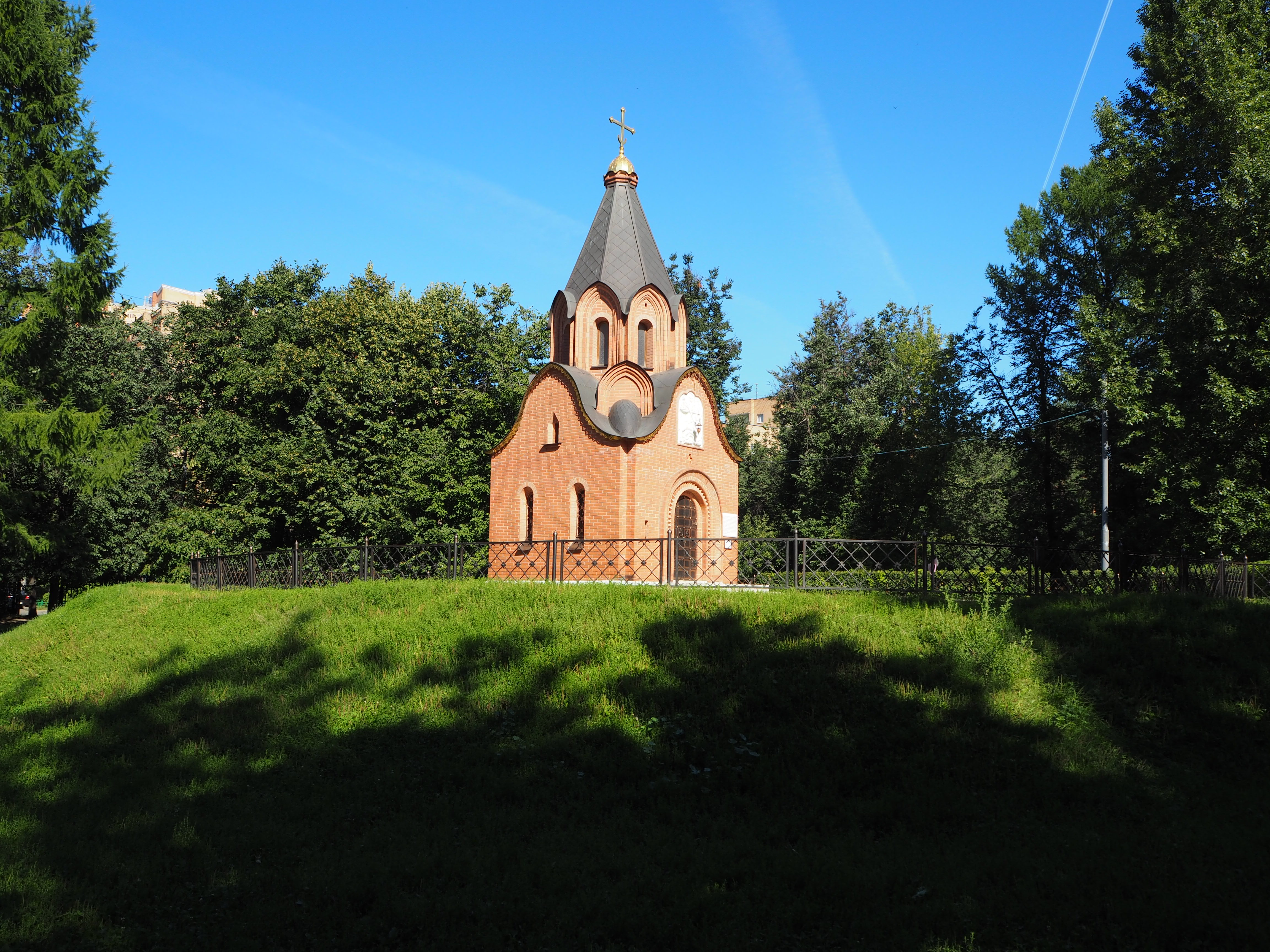 Часовня Спаса Преображения на Братском воинском кладбище.